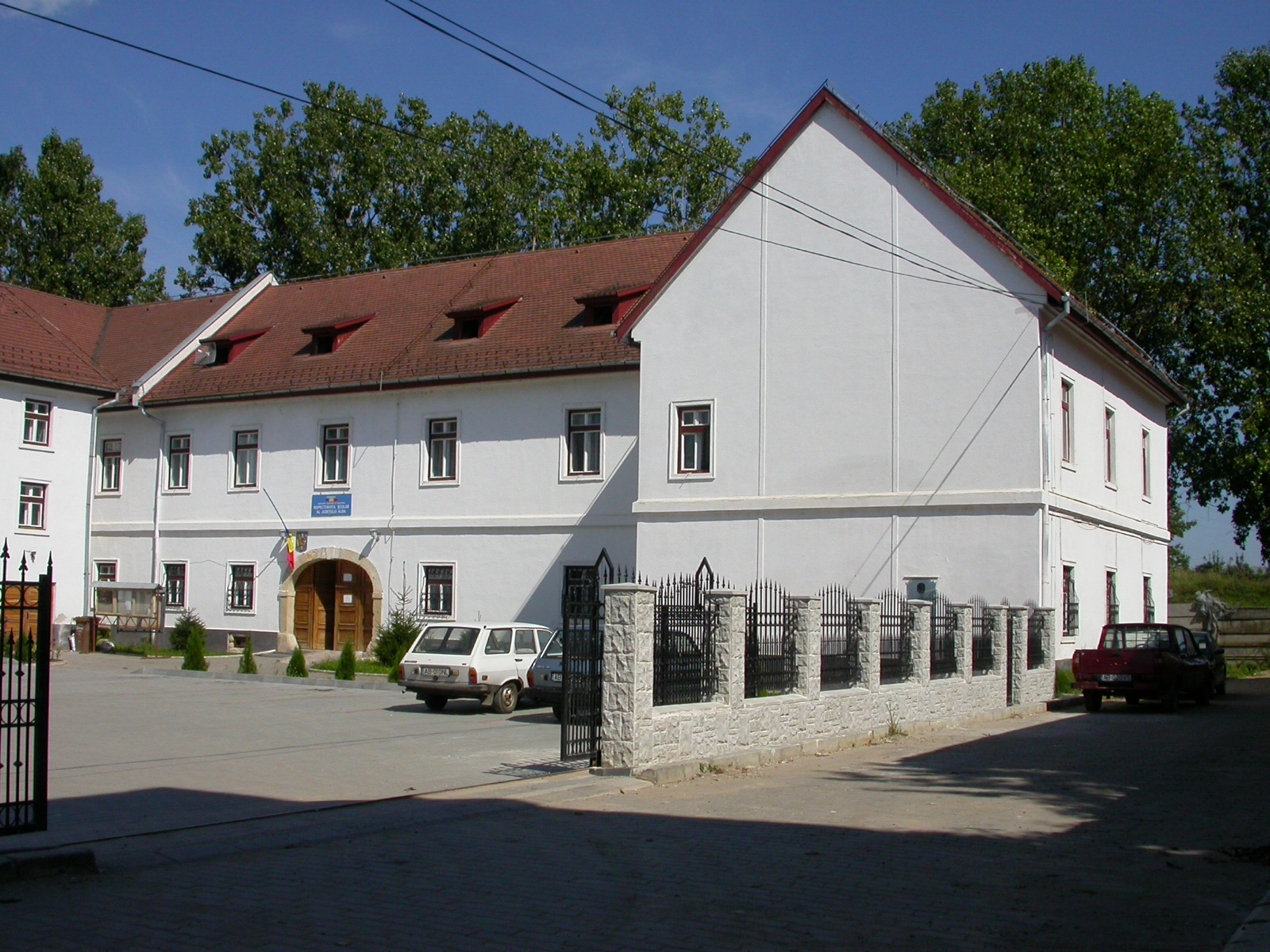 Fosta Prefectură, azi Inspectorat școlar județean, sec. XVIII